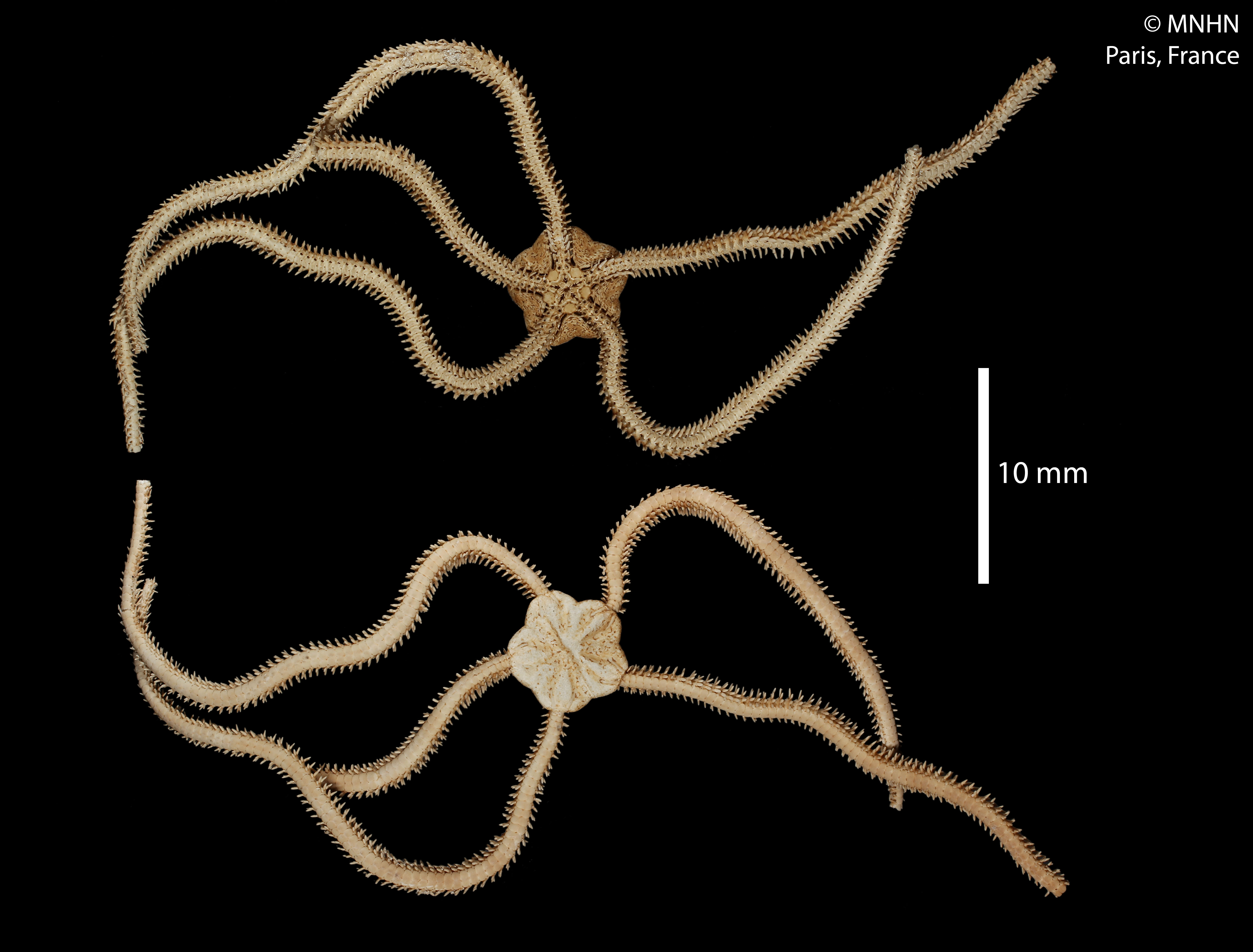 Ophiopsila paucispina Koehler, 1907 - SYNTYPE(S)Spécimen MNHN-IE-2013-10221Collection : Échinodermes (IE)Muséum National d'Histoire Naturelle (Paris, France) Origine : Libellé du pays : MOZAMBIQUE Localité/Lieu-dit : Fernando Veloso (Fernão Veloso) Océan : Indien Île : Inhaca